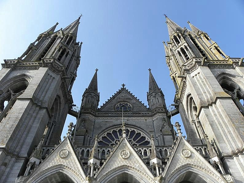 Basilique Notre-Dame d'Espérance de Pontmain (53).